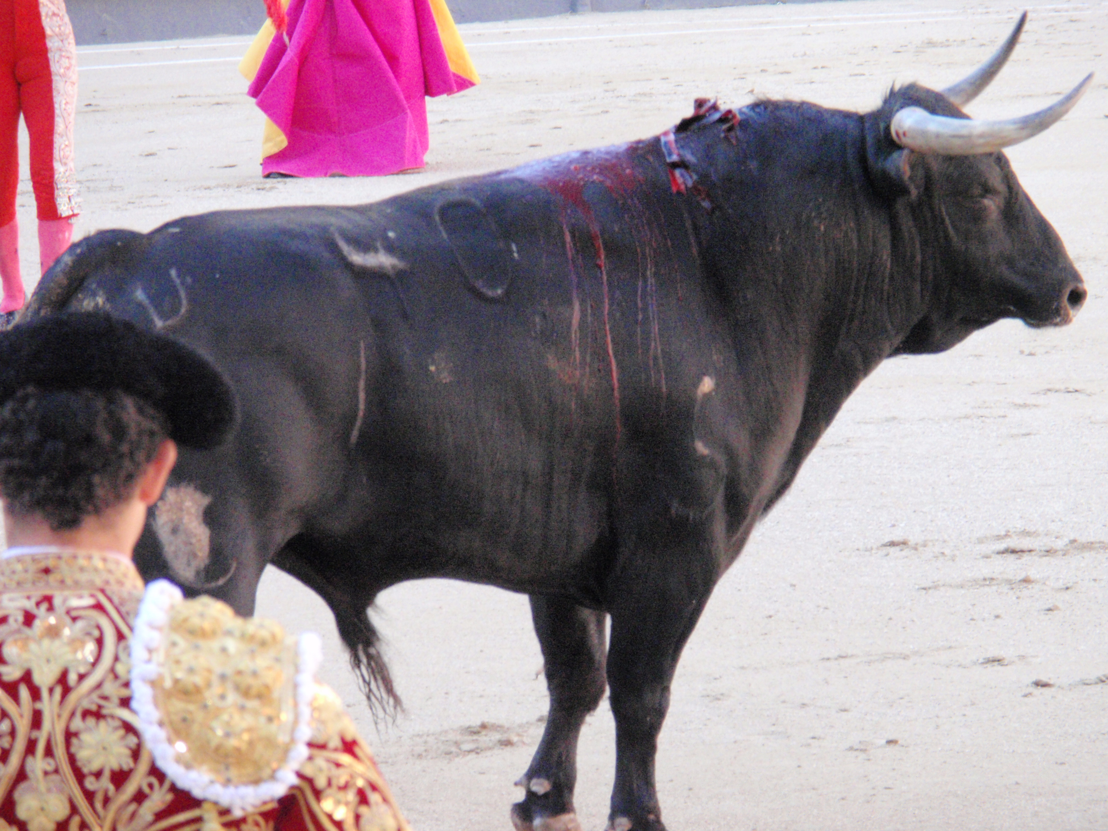 At Plaza de Toros de Las Ventas in Madrid